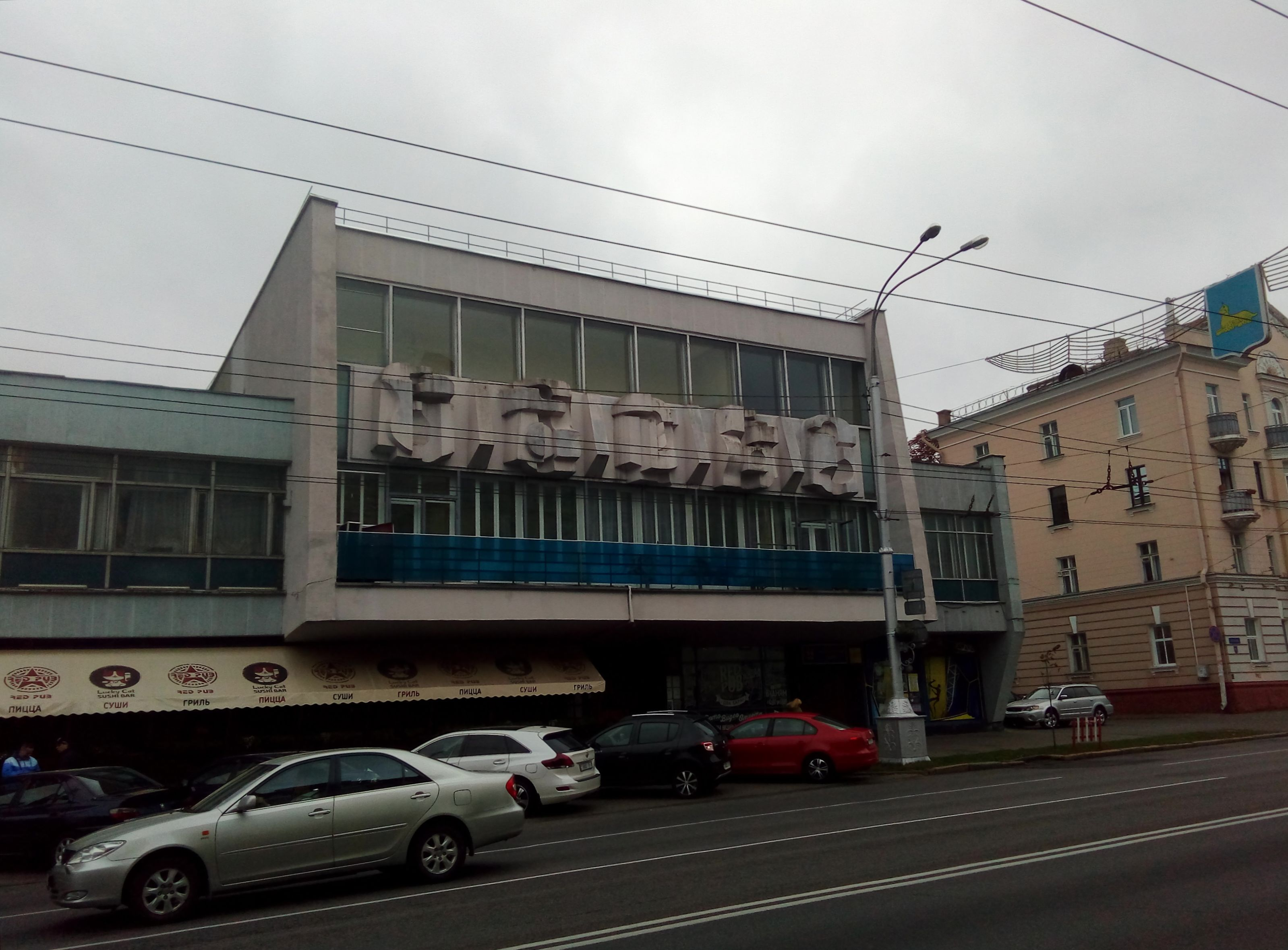 Рэльефная кампазіцыя на будынку Дзіпражыўмаша